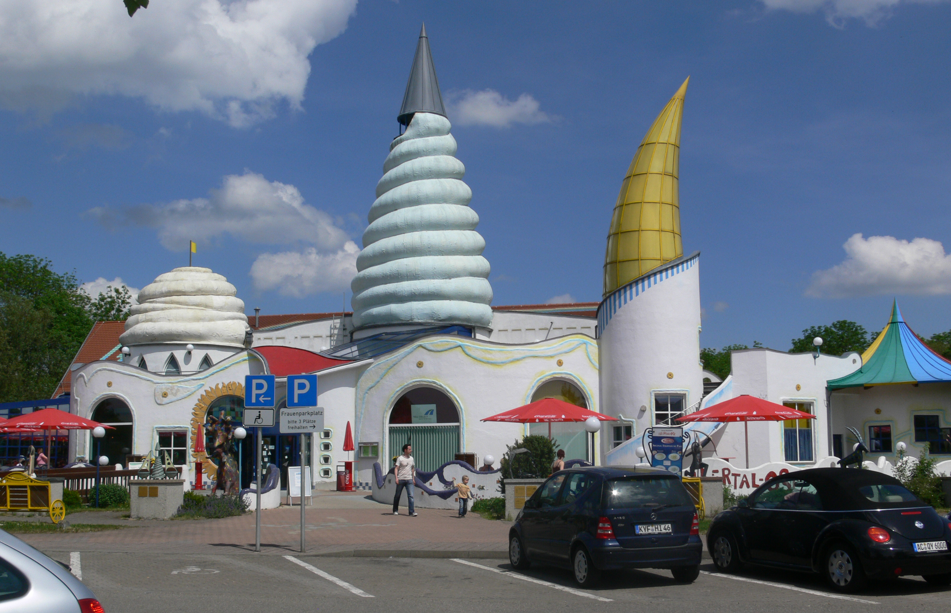 Raststätte "Illertal-Ost" an der Bundesautobahn 7, Deutschlands erste künstlerisch gestaltete Autobahnraststätte (eröffnet 1997), Dettingen an der Iller